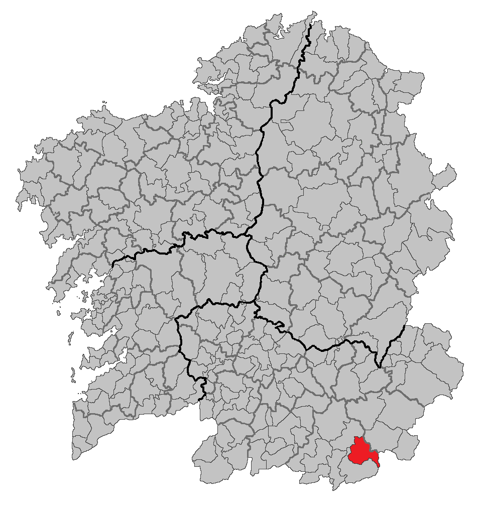 Mapa coa localización do concello de Riós.